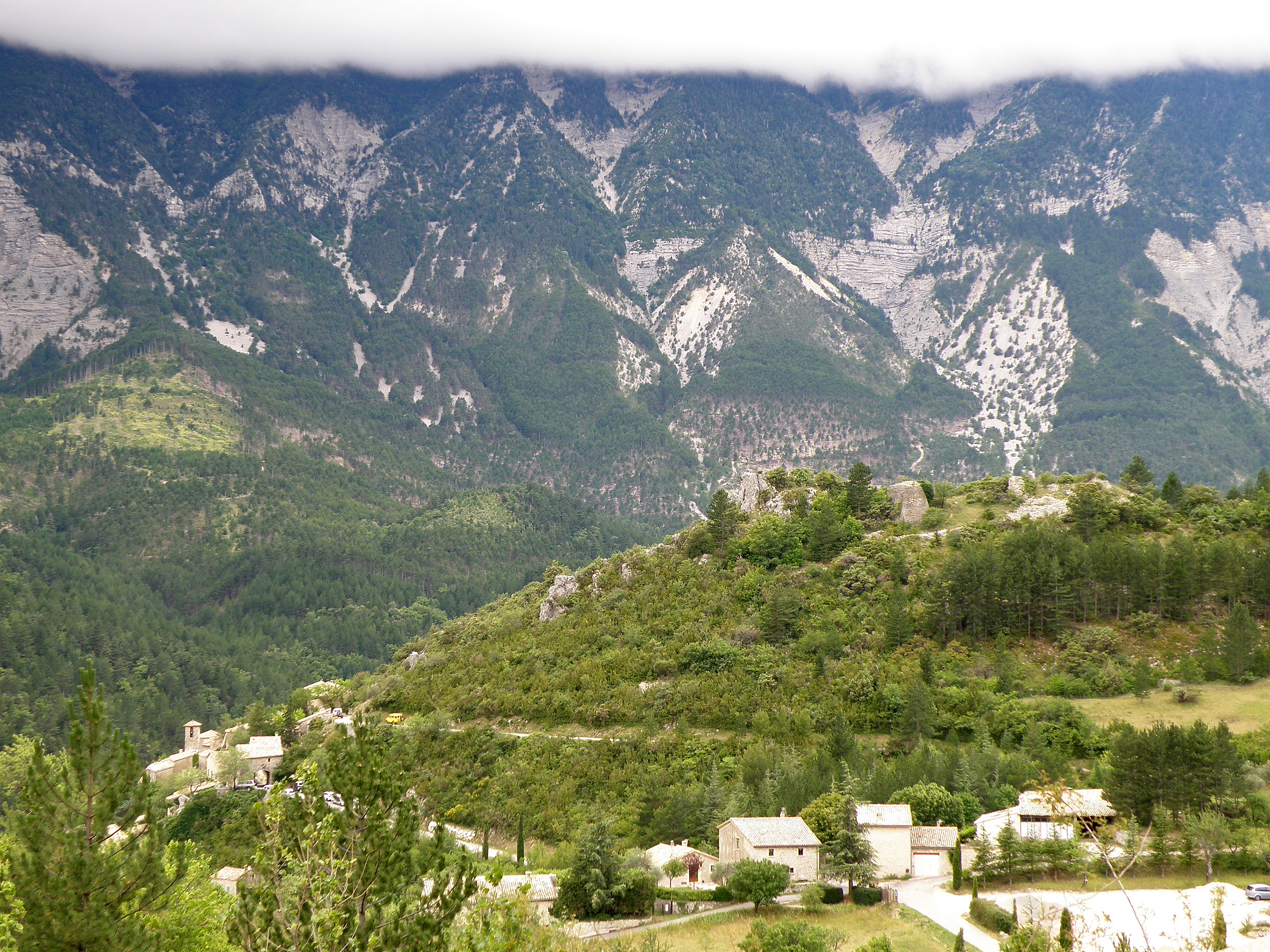 Brantes (Vaucluse, France). Vue générale. Au fond, le mont Ventoux à la cime ennuagée.